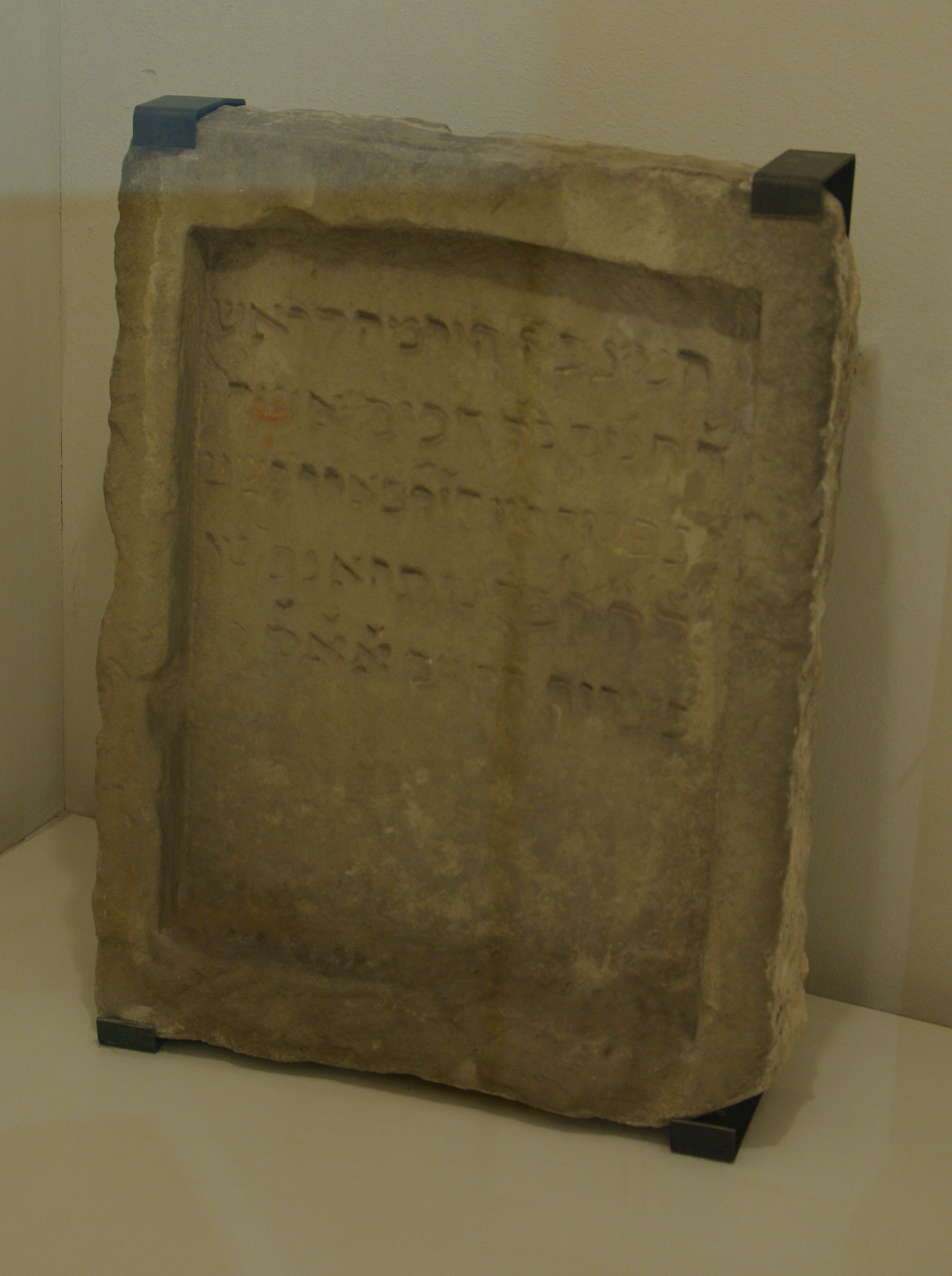 Grabstein des mittelalterlichen Jüdischen Friedhofes in Rothenburg ob der Tauber, ausgestellt im Jüdisches Museum Franken in Fürth